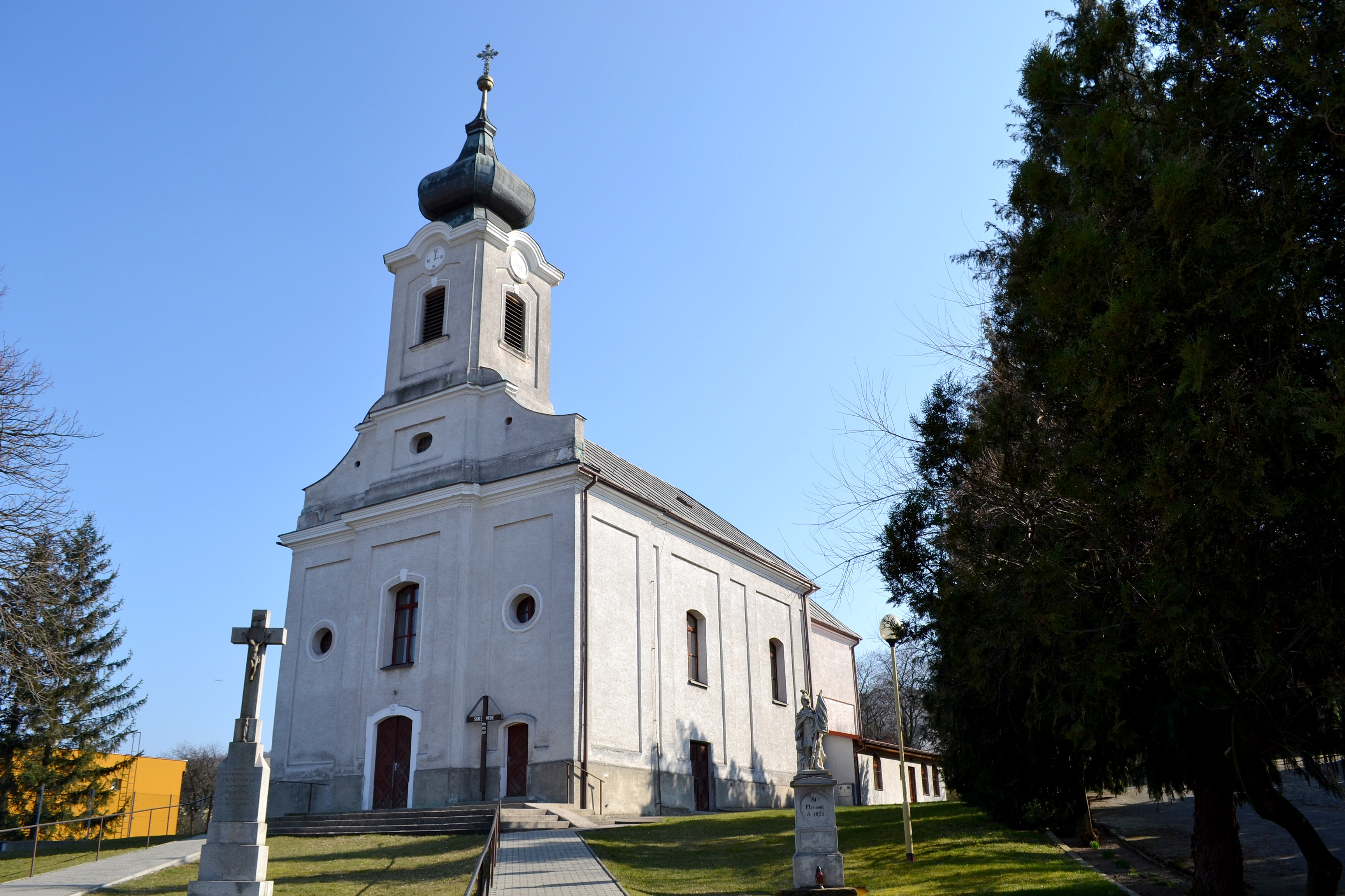 Cerová, klasicistický farský Kostol svätého Anjela strážcu z roku 1802